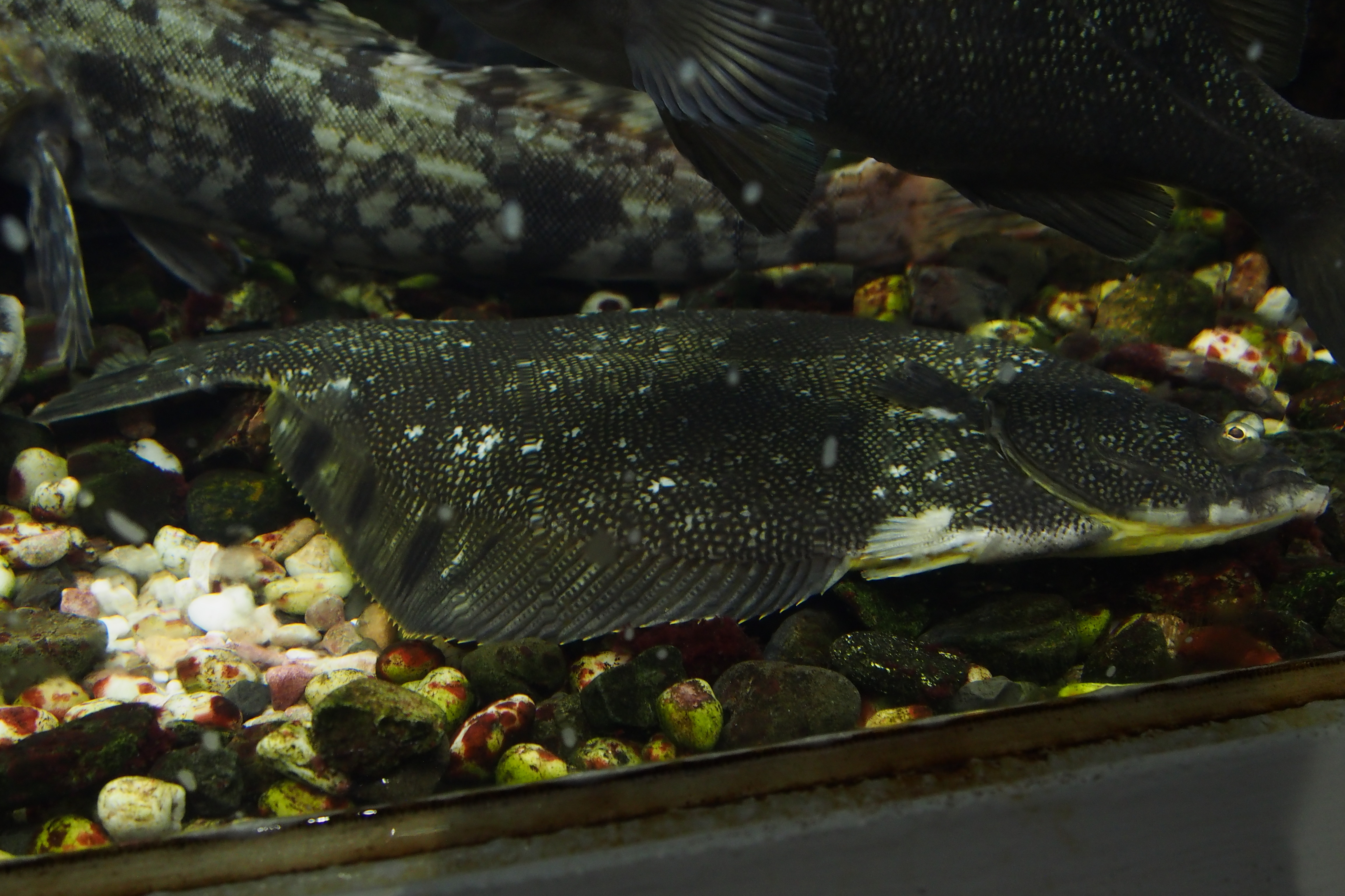 in Sunpiazza aquarium.